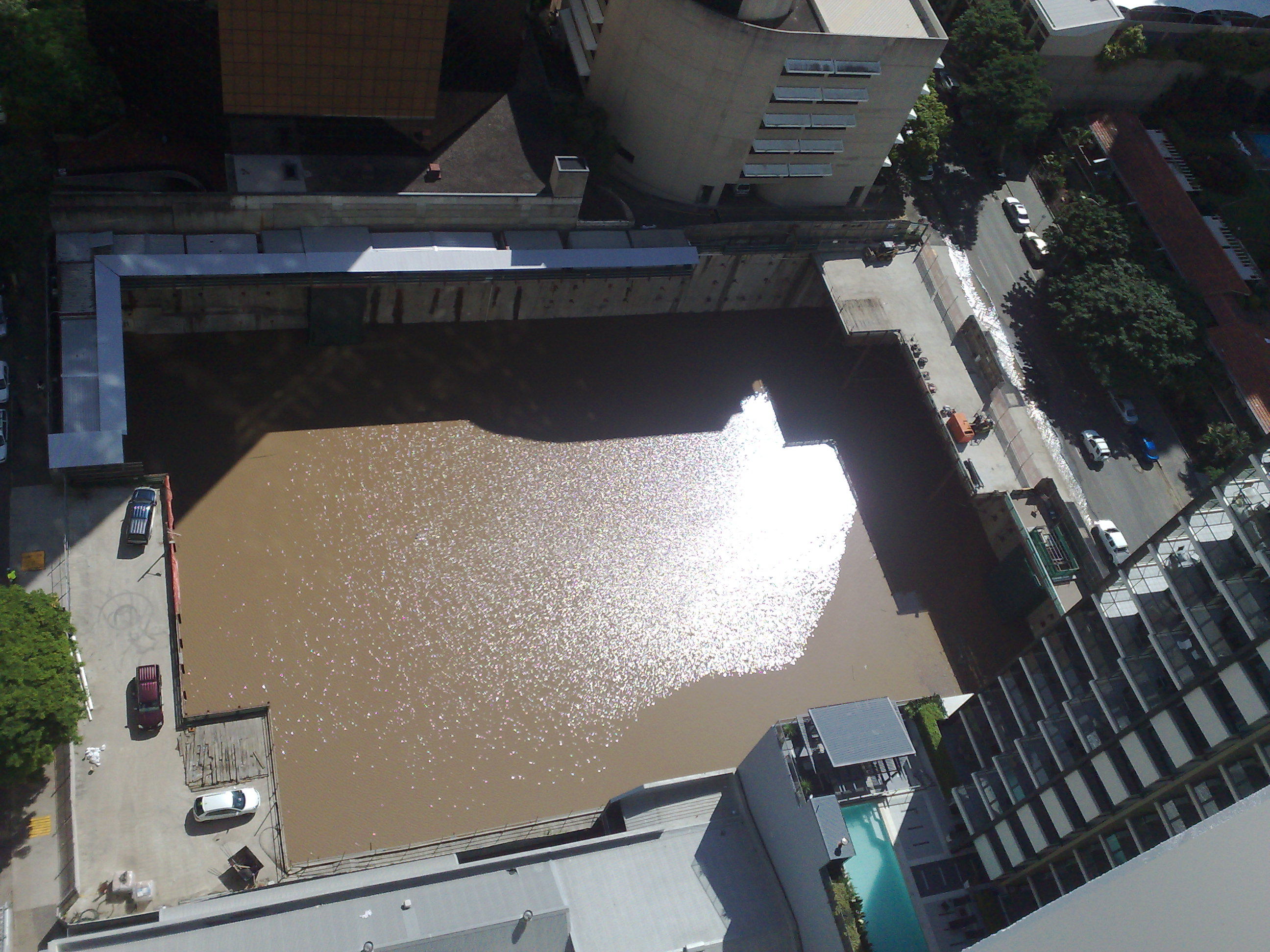 After Brisbane River floods.